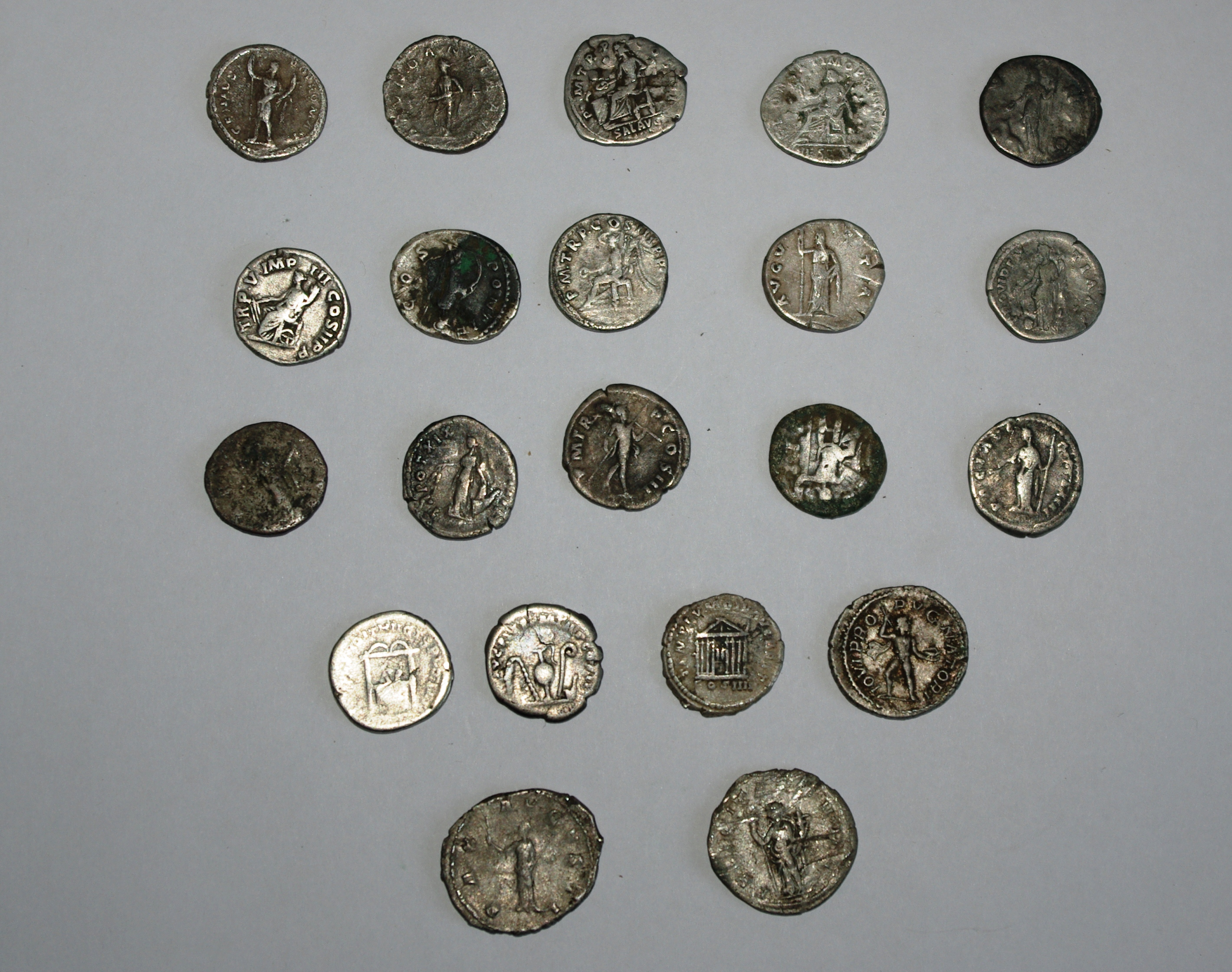 з книги "Історія Тиврівщини"